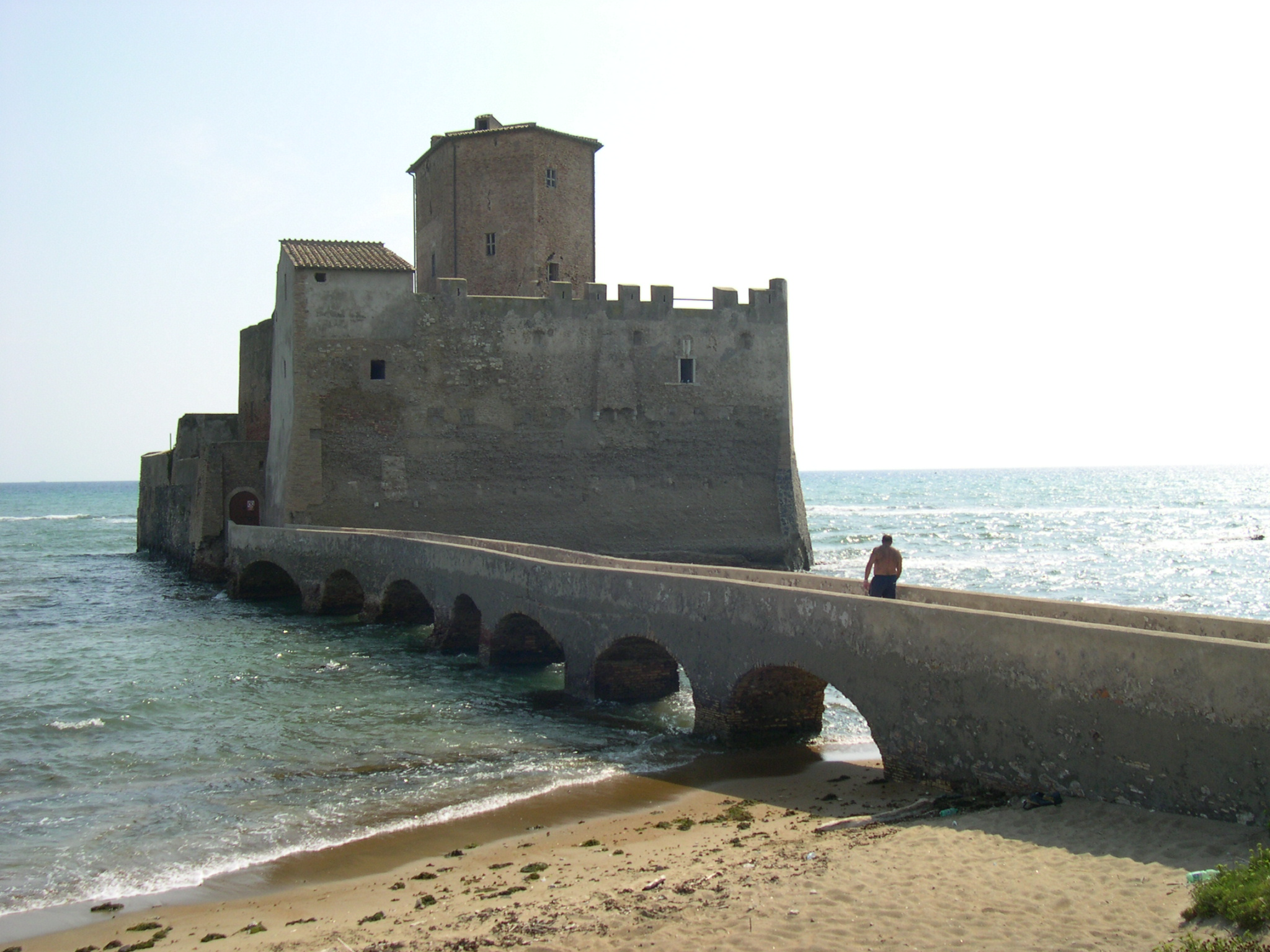 Alessio Antonietti, personale, torre astura